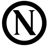 Il marchio di certificazione NEMKO.